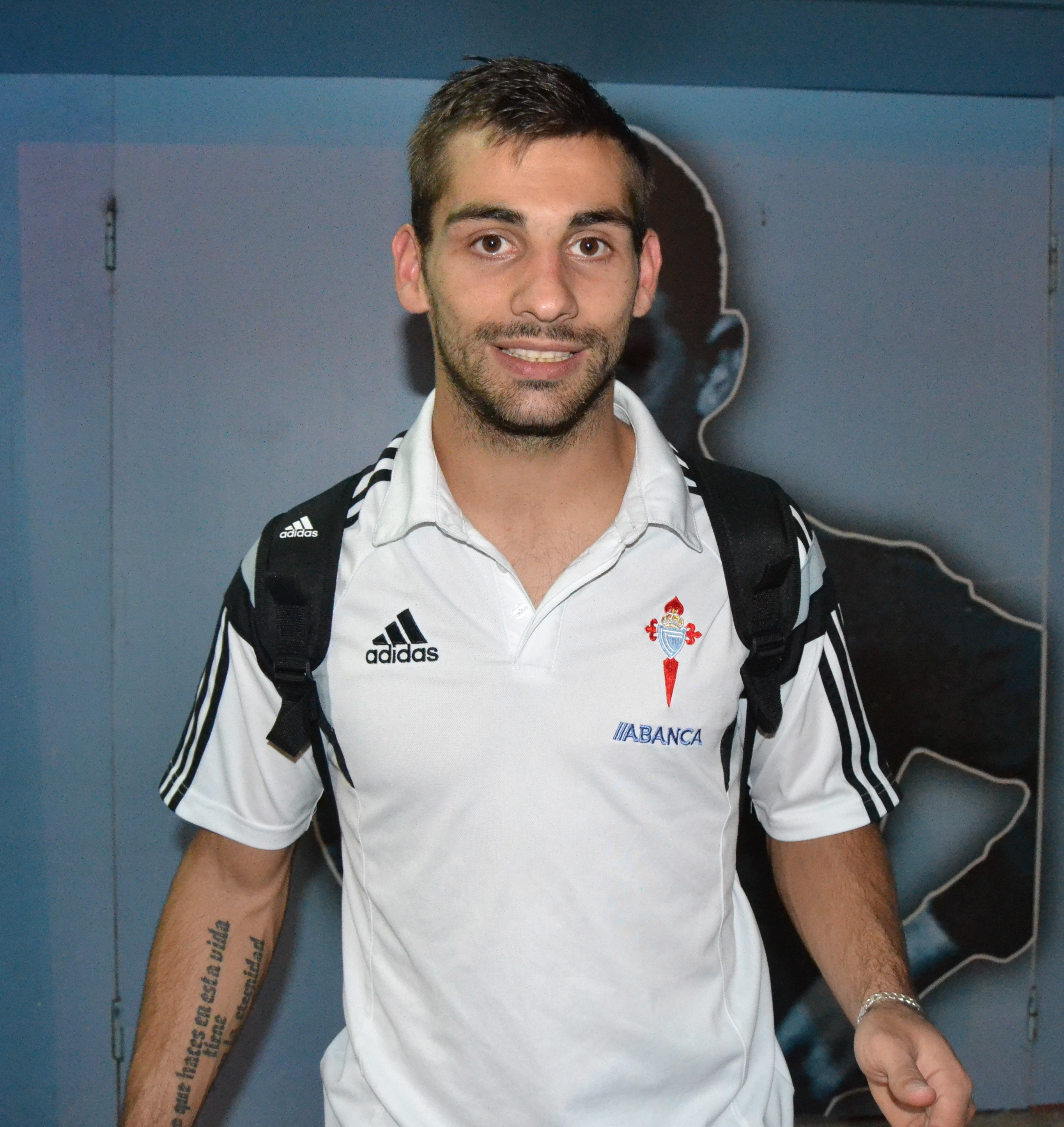 O futbolista Jonathan Castro Otto